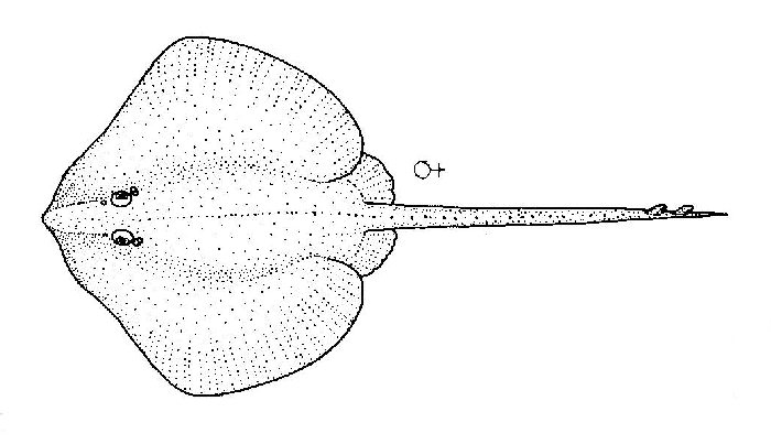 Notoraja spinifera (Spiny deepsea skate)